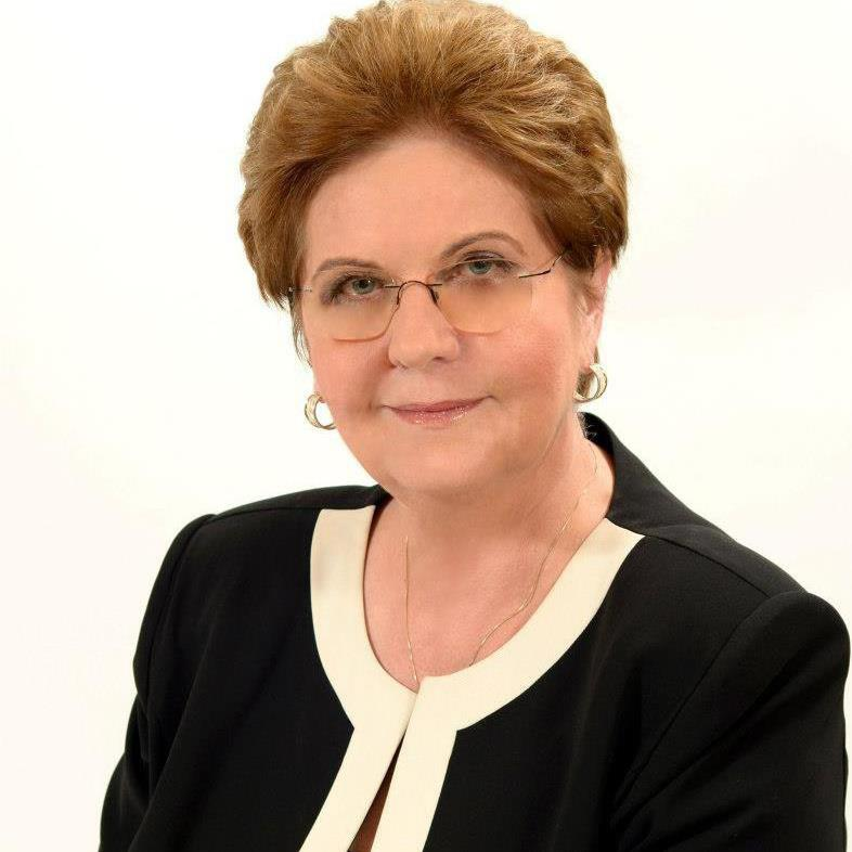 Mariana CÂMPEANU